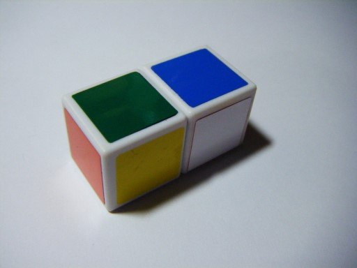 轉亂後的1x1x2魔術方塊